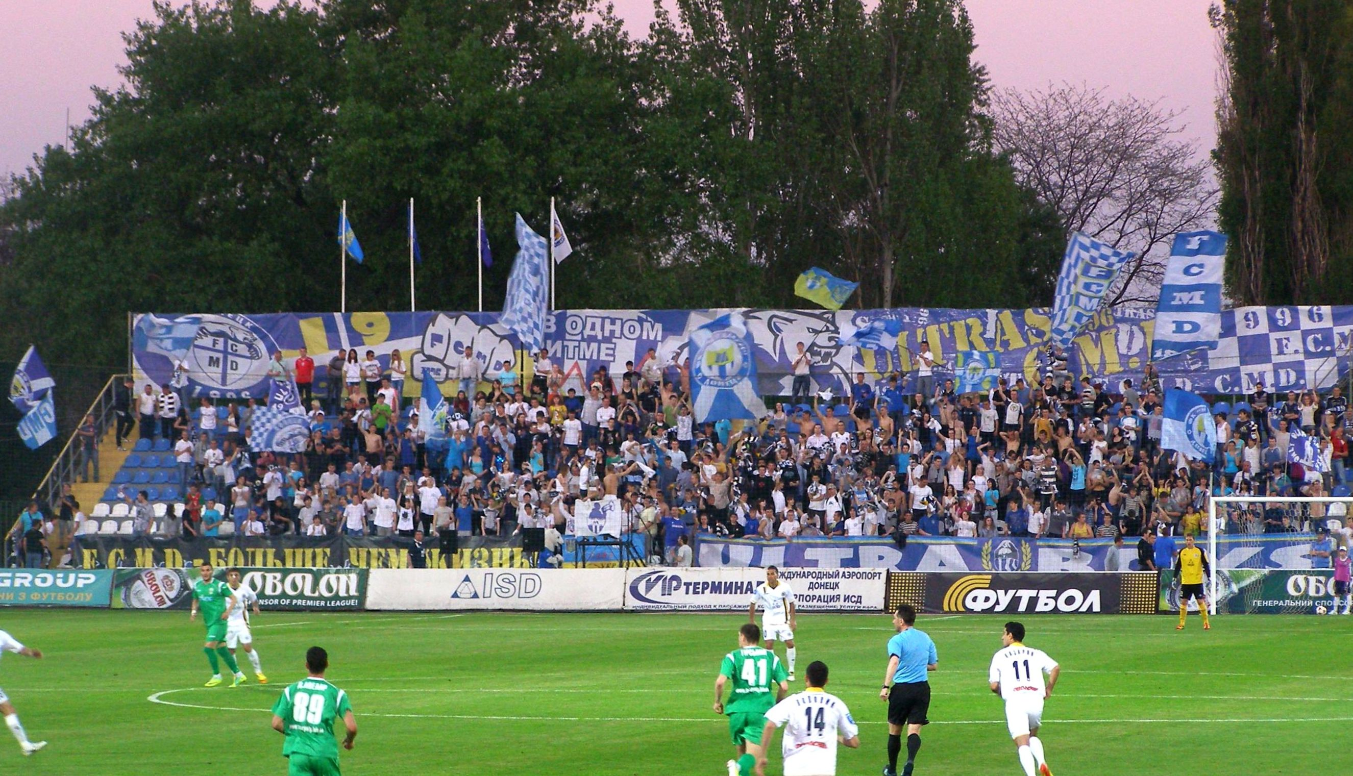 Уболівальники "Металурга" (Донецьк)